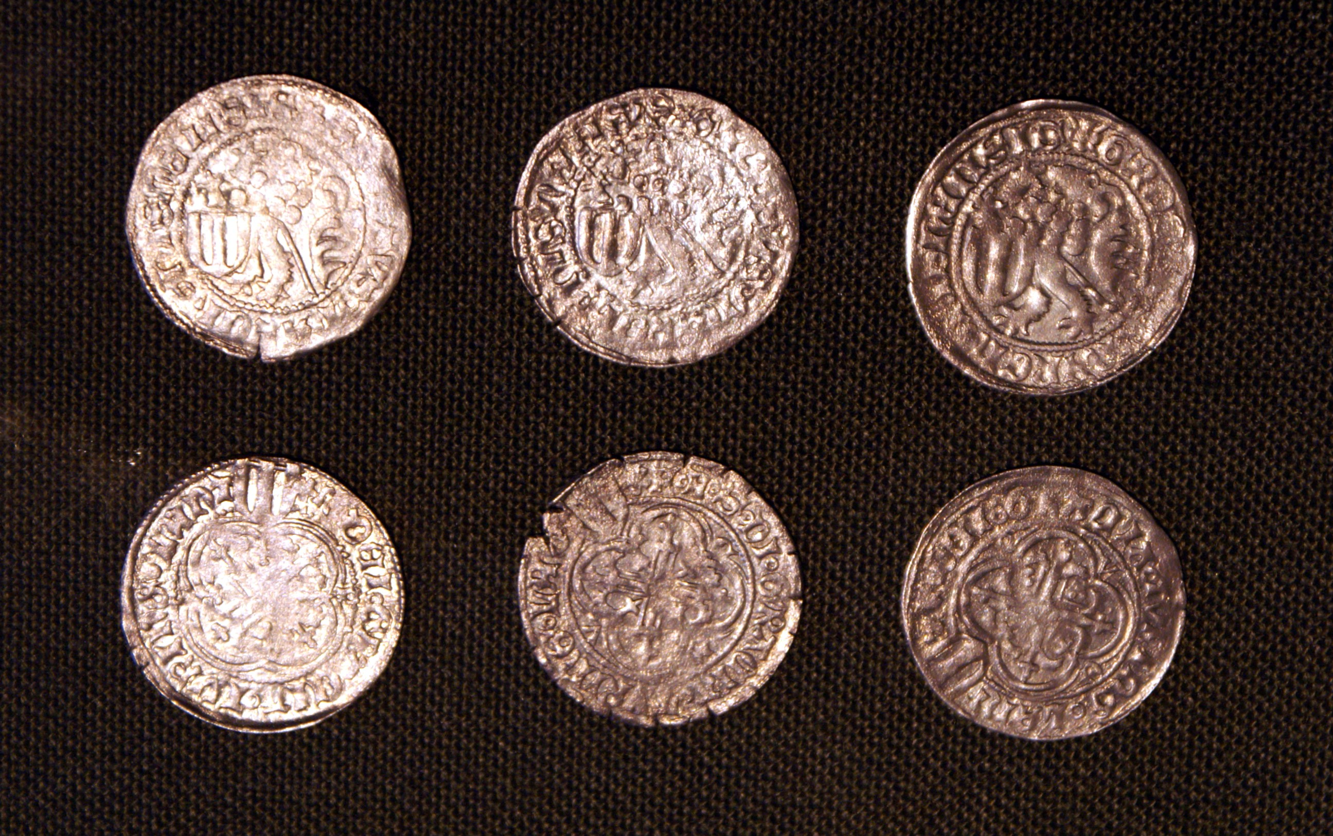 Meißner Schildgroschen und hessische Groschen, geprägt vor 1437, aus dem Beeskoweer Münzschatz, gefunden 1986